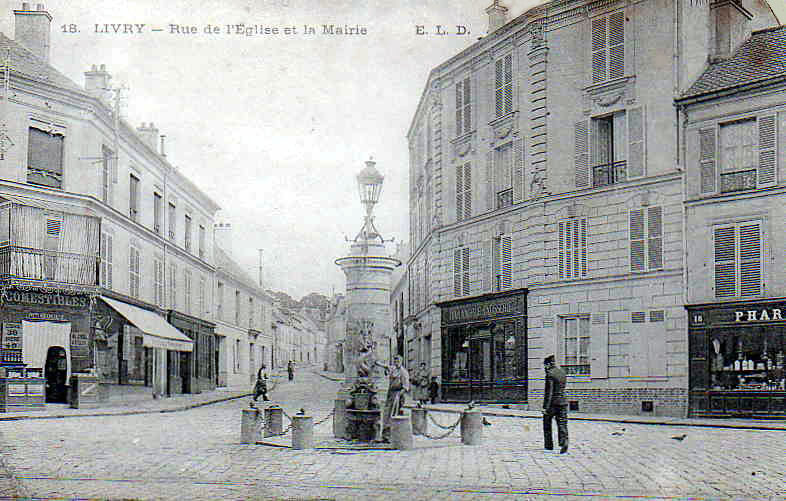 Livry Gargan - rue de l'église et la mairie vers 1900